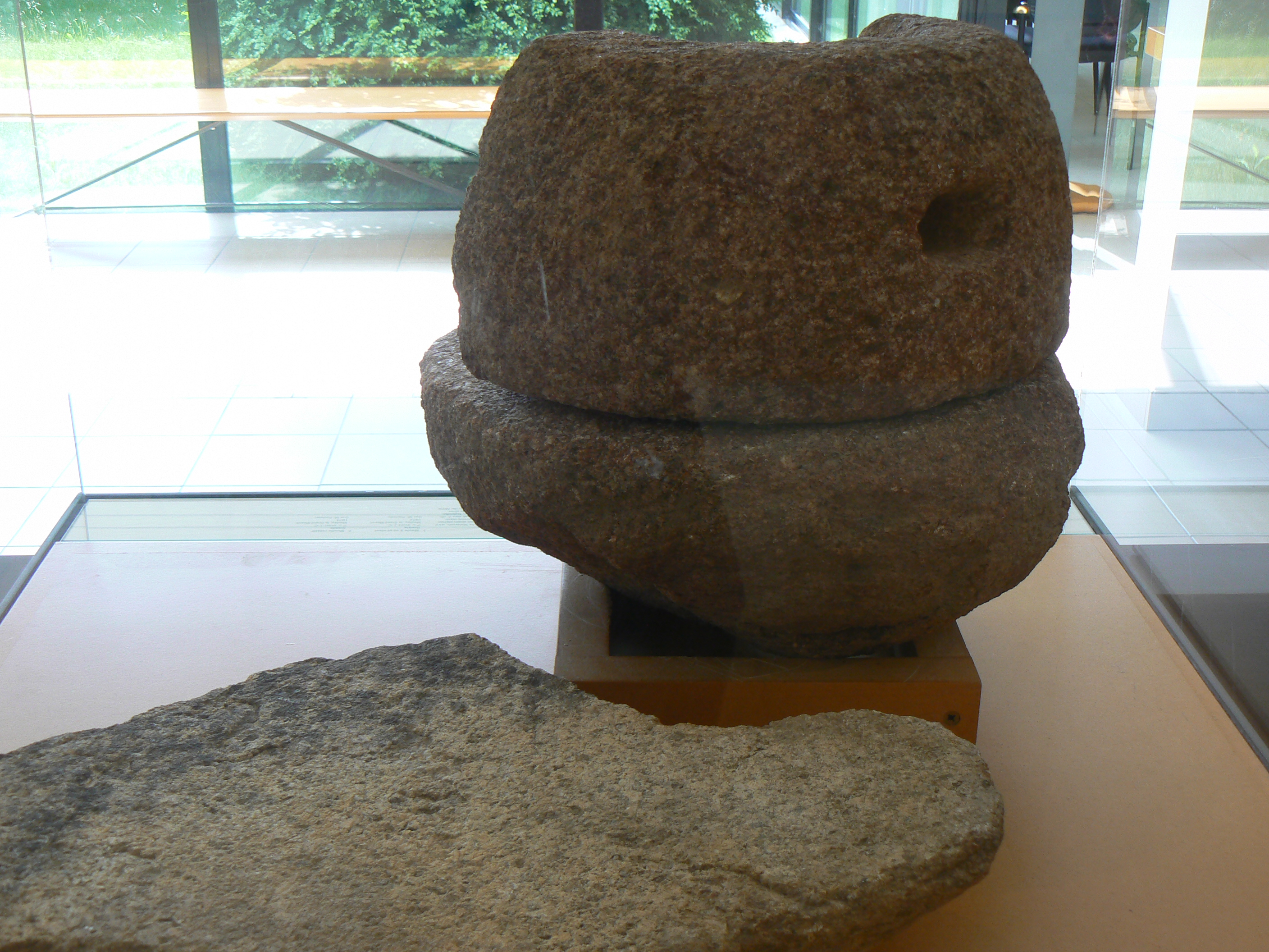 Meules provenant de l'oppidum gaulois de Moulay (Mayenne)